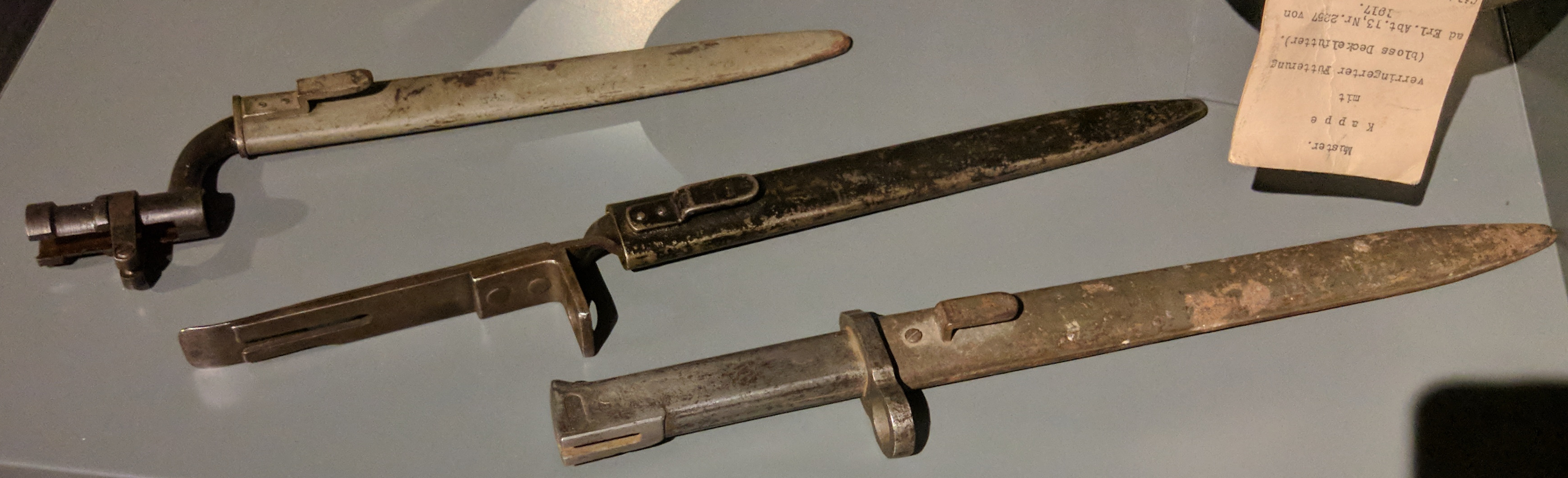 Nadomestni (Ersatz) bajoneti, ki so bili cenejši za izdelavo kot navadni, začeli so se proizvajati proti koncu 1. sv. vojne.